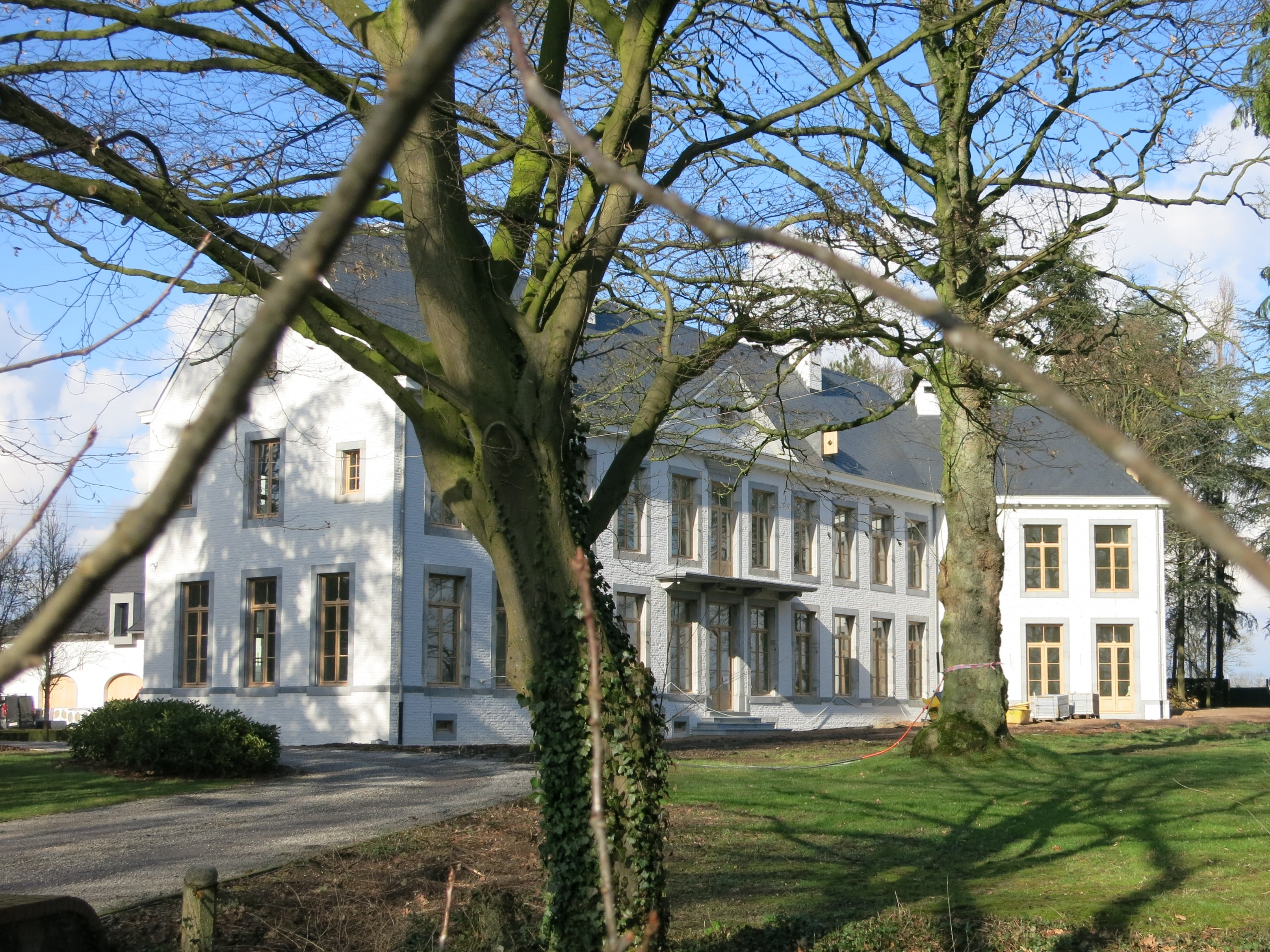 Kasteel Henegauw herbouwd na afbraak van de ruïne